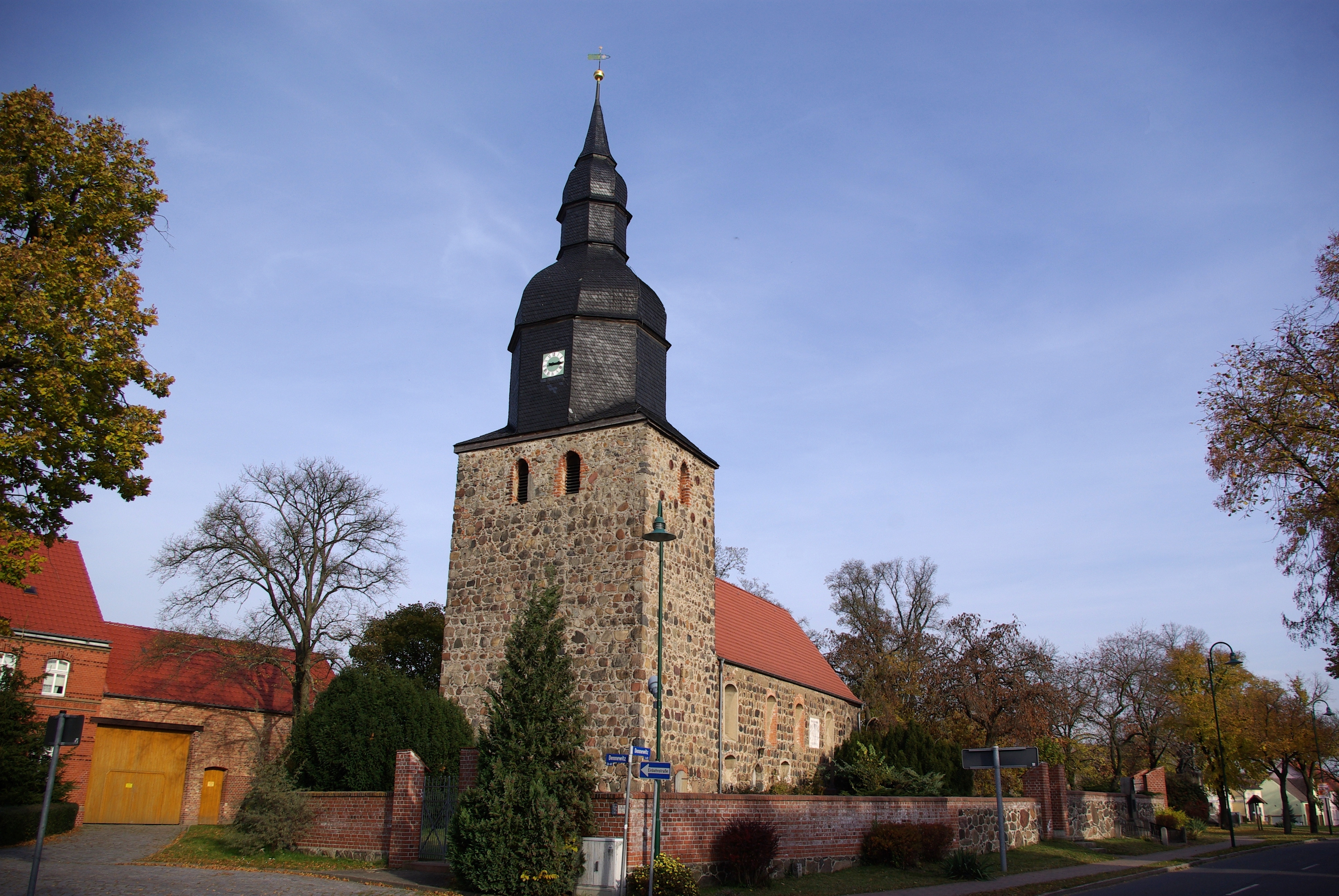 Niedergörsdorf in Brandenburg. Die Kirche im Ortsteil Dennewitz steht unter Denkmalschutz.